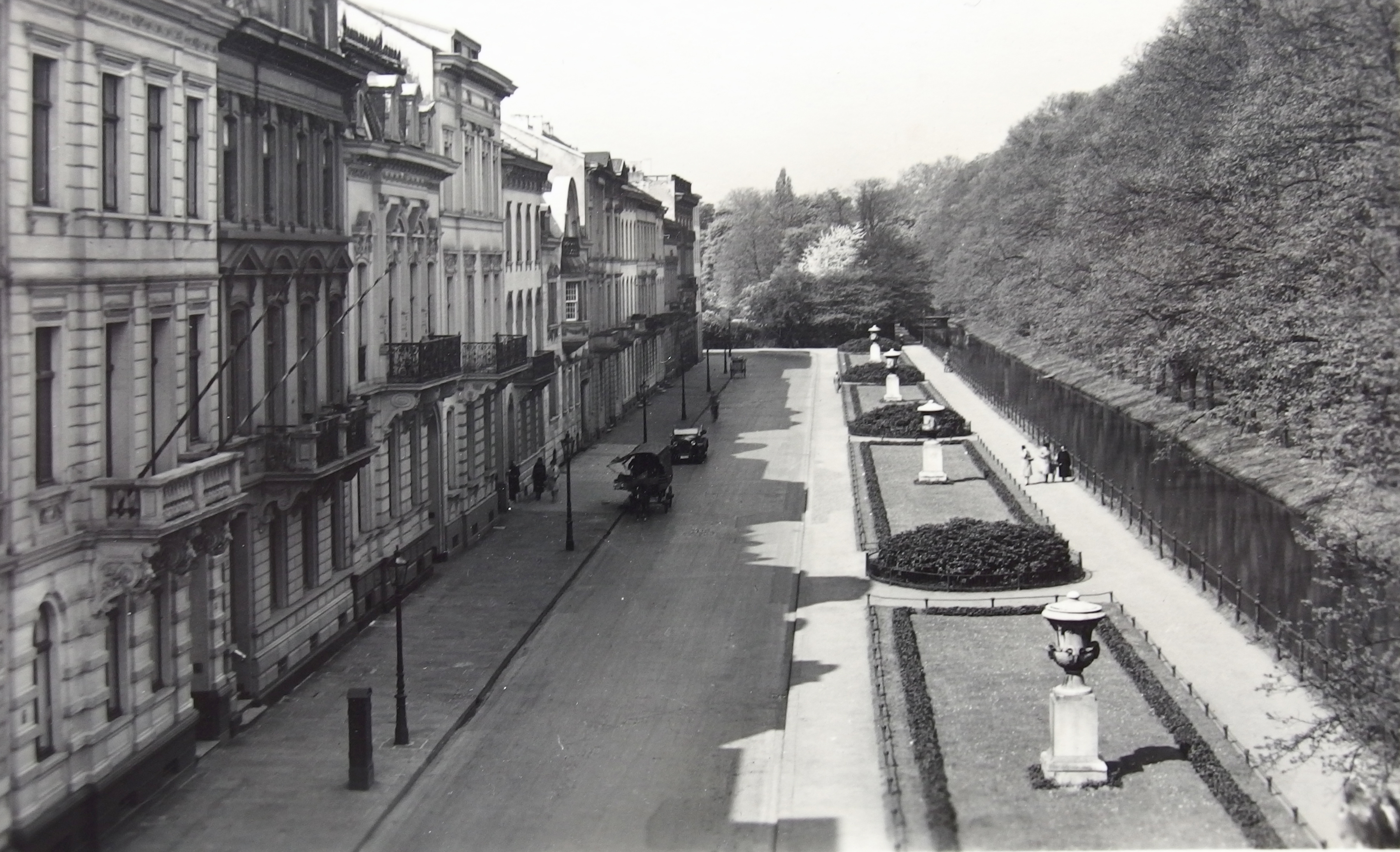 Ansicht der Goltsteinstraße am Hofgarten Düsseldorf